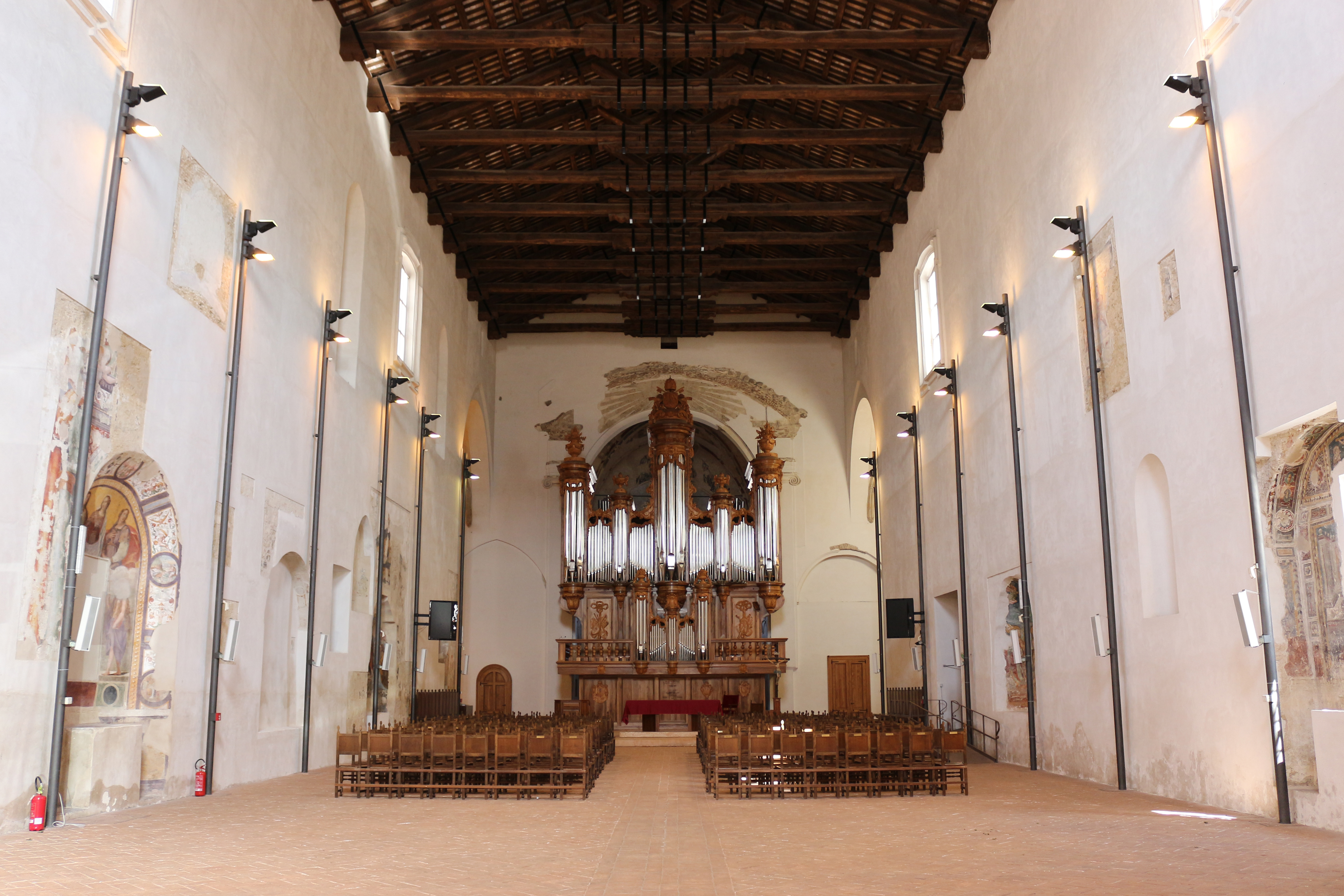 Interno della Chiesa di San Domenico, Rieti This is a photo of a monument which is part of cultural heritage of Italy. Questa è una foto di un bene culturale italiano che partecipa al concorso Wiki Loves Valle del Primo Presepe 2019, gestito in coperazione con Wikimedia Italia. This is a photo of a monument which is part of cultural heritage of Italy. This monument participates in the contest Wiki Loves Valle del Primo Presepe 2019, operated in cooperation with Wikimedia Italia.